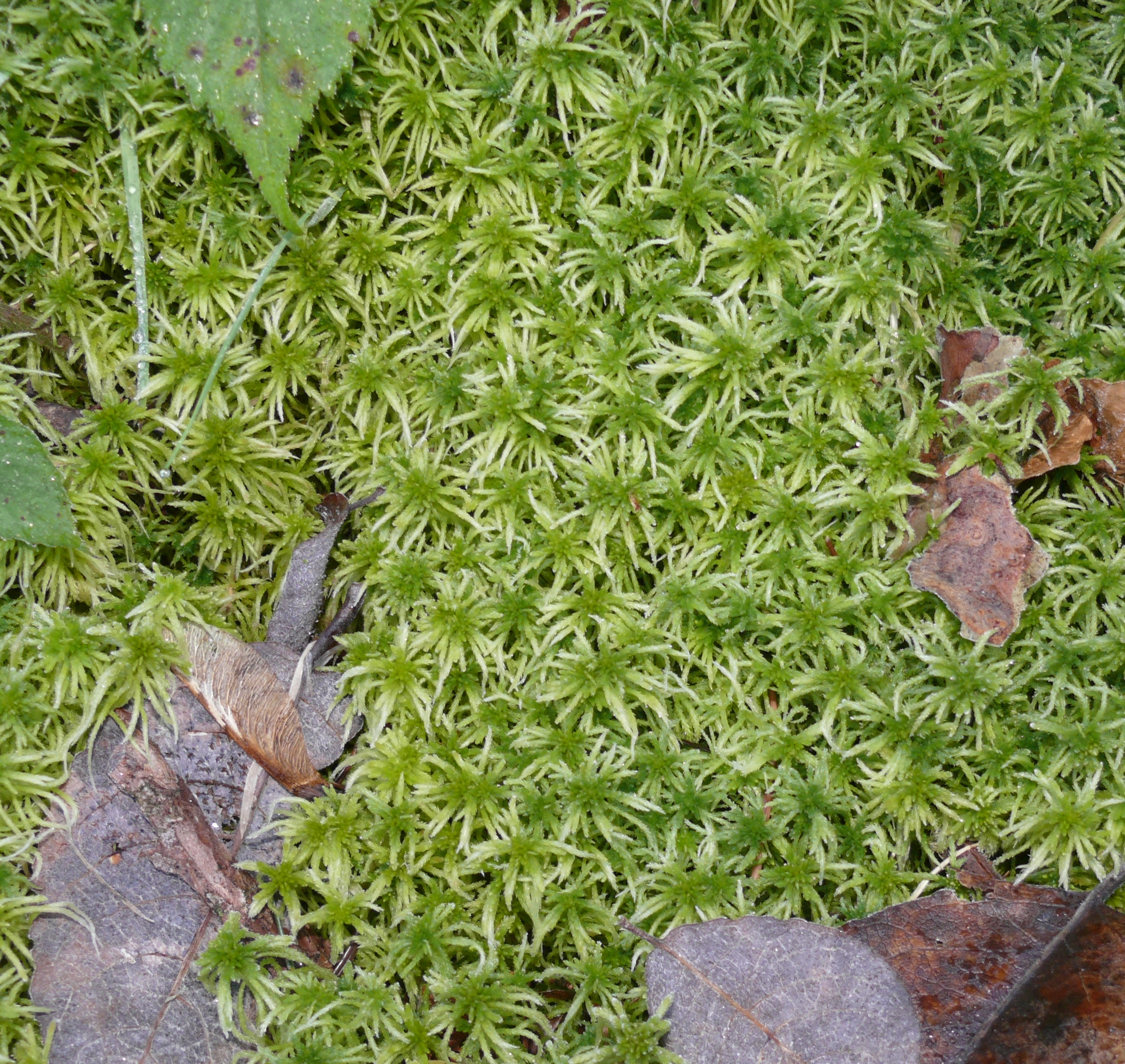 Sphagnum girgensohnii, Schwäbisch-Fränkische Waldberge, Germany